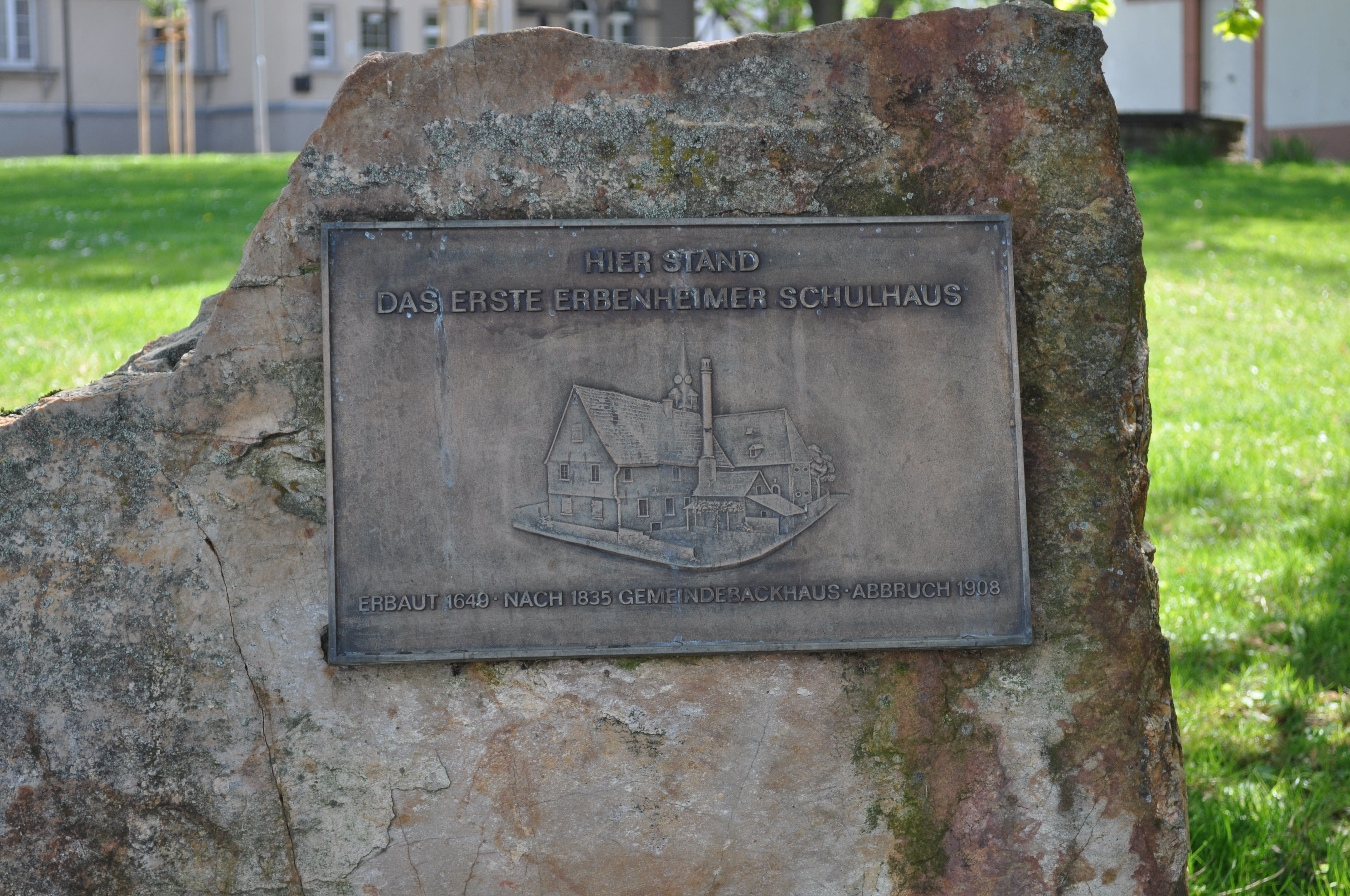 Gedenkstein an das erste Schulhaus in Wiesbaden-Erbenheim